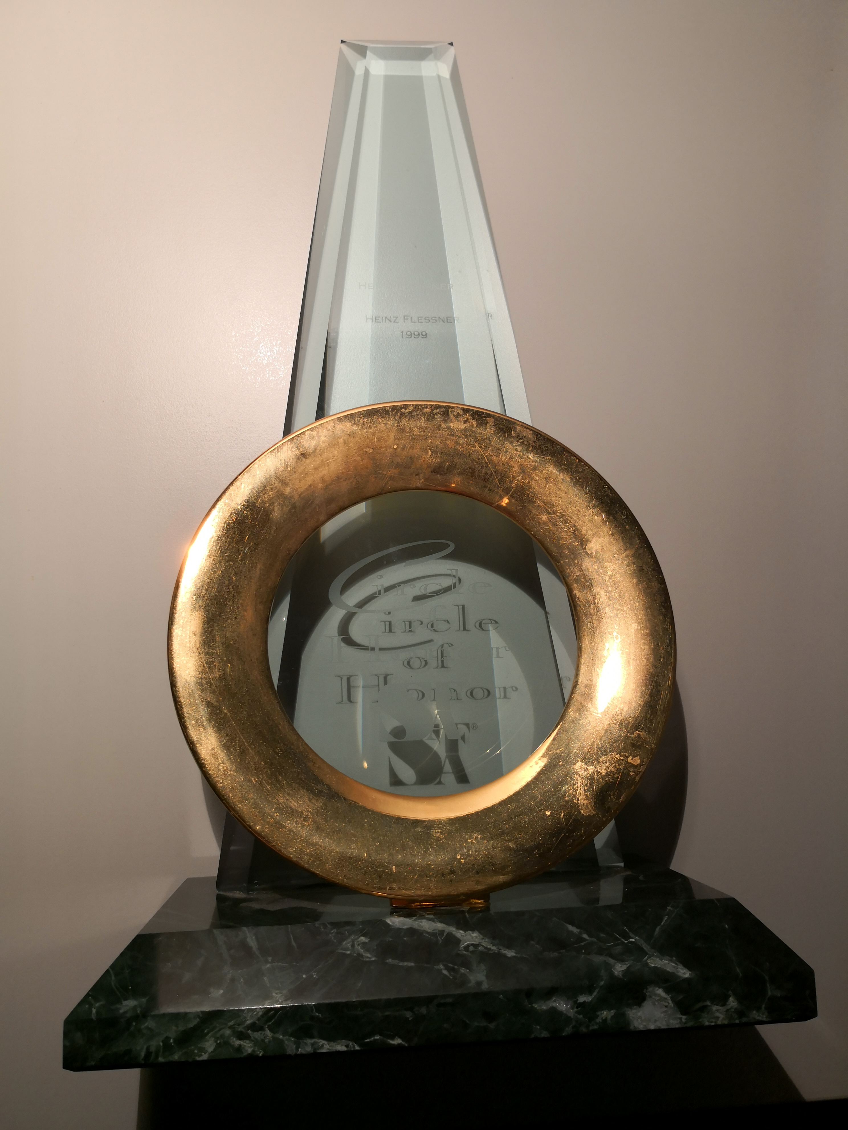 Pokal des Circle of Honour der SFA für Heinz Flessner im Jahre 1999